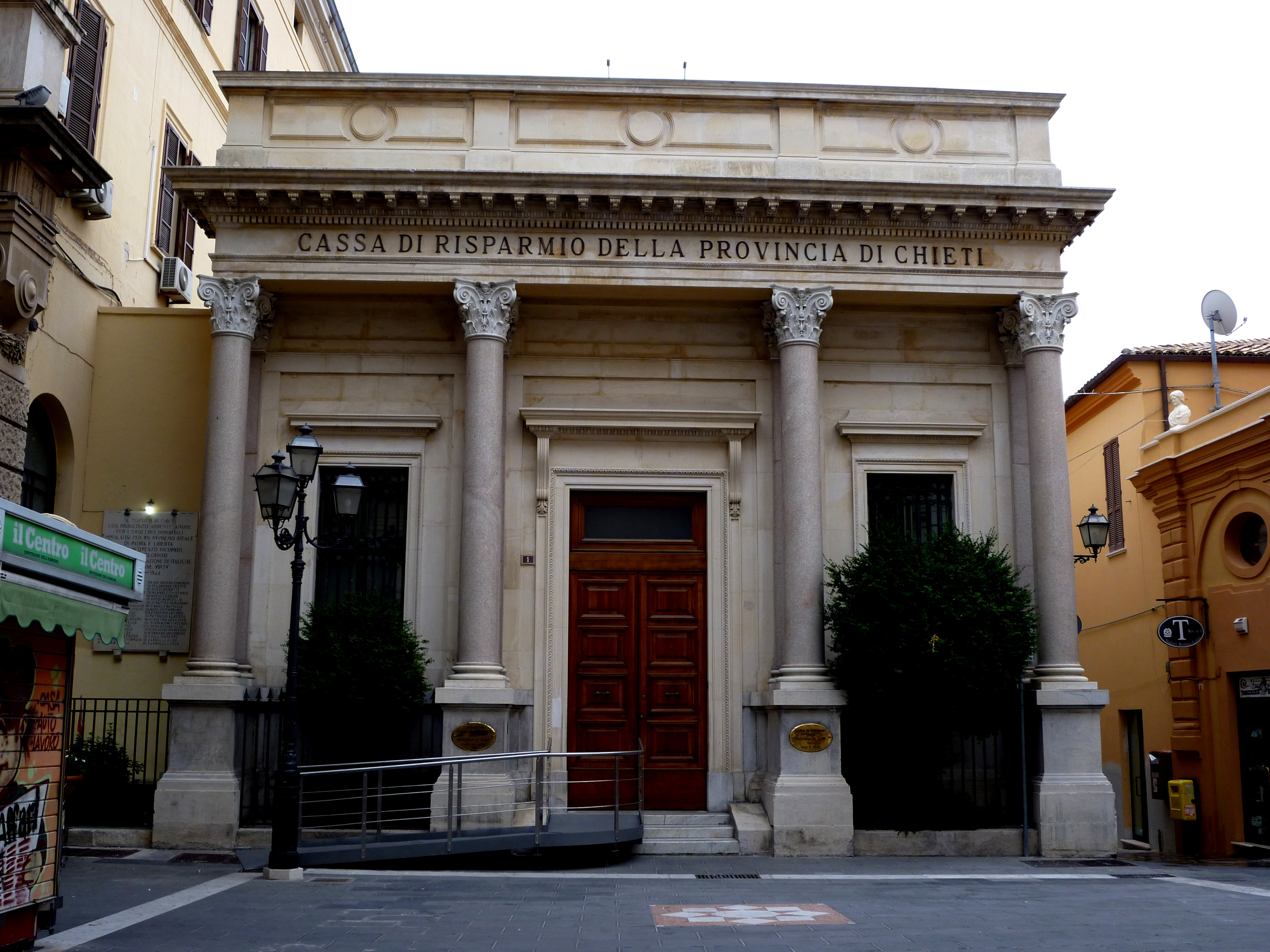 Facciata del palazzo della Cassa di Risparmio, Chieti.